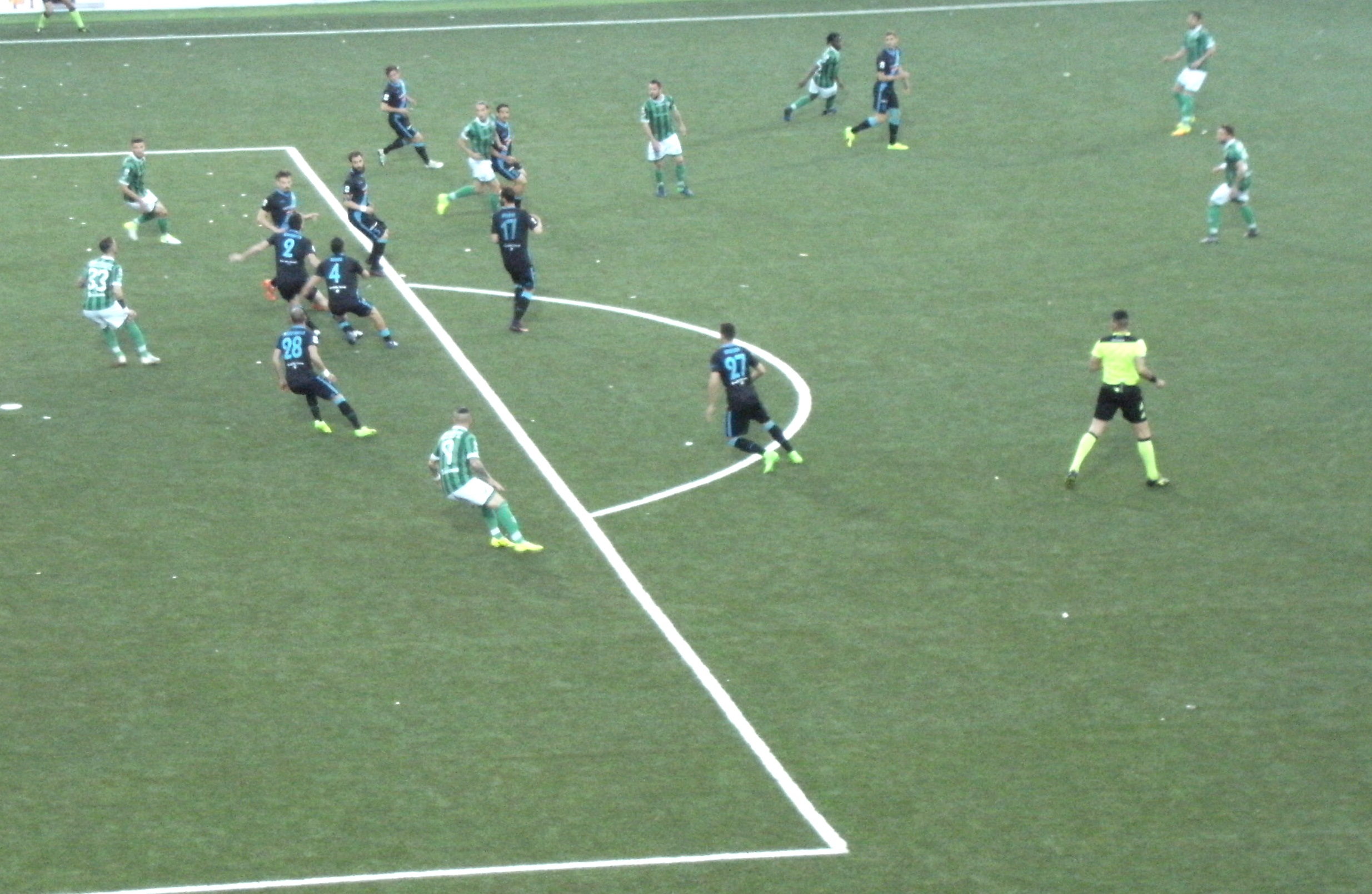 Fase di gioco dell'incontro Unione Sportiva Avellino - S.P.A.L. 2013 (1-0, 31/03/2017 - Stadio Partenio Lombardi di Avellino)